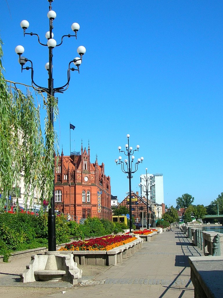 Ulica Stary Port i bulwar nad Brdą w Bydgoszczy